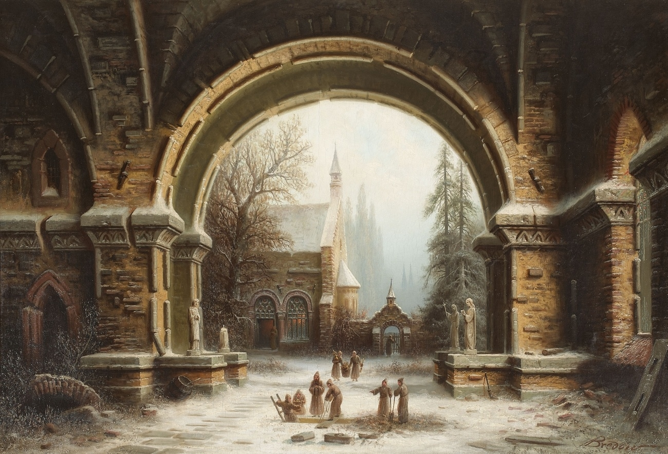 Klosterhof im Schnee. Signiert unten rechts: Bredow. Öl auf Leinwand. 97 x 143 cm.